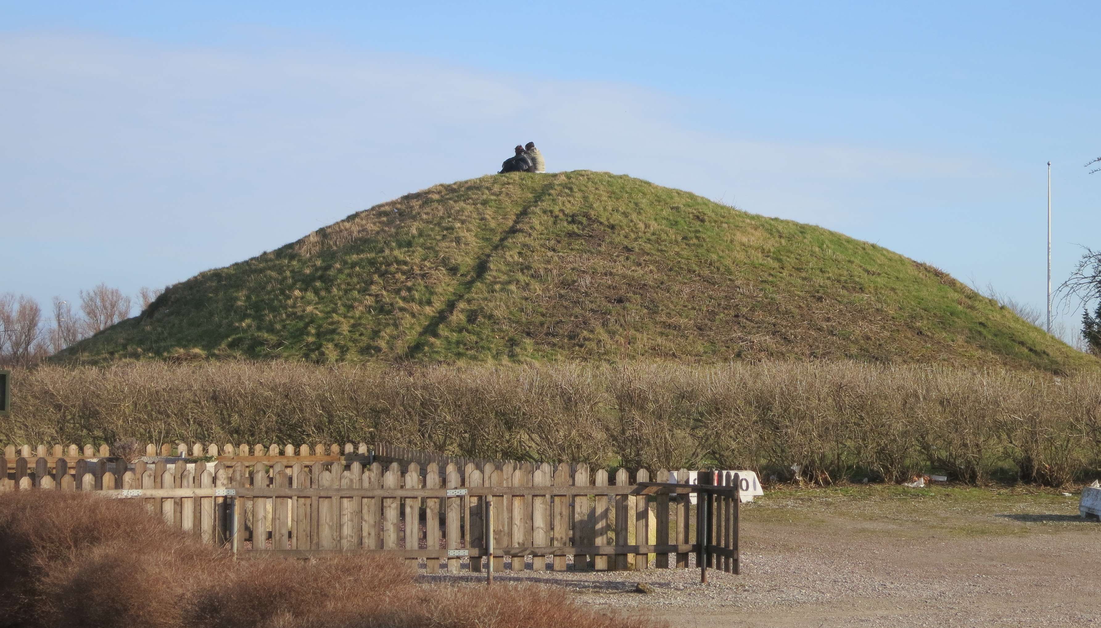 Skävehög, Fosie 9:1, gravhög i Malmö kommun